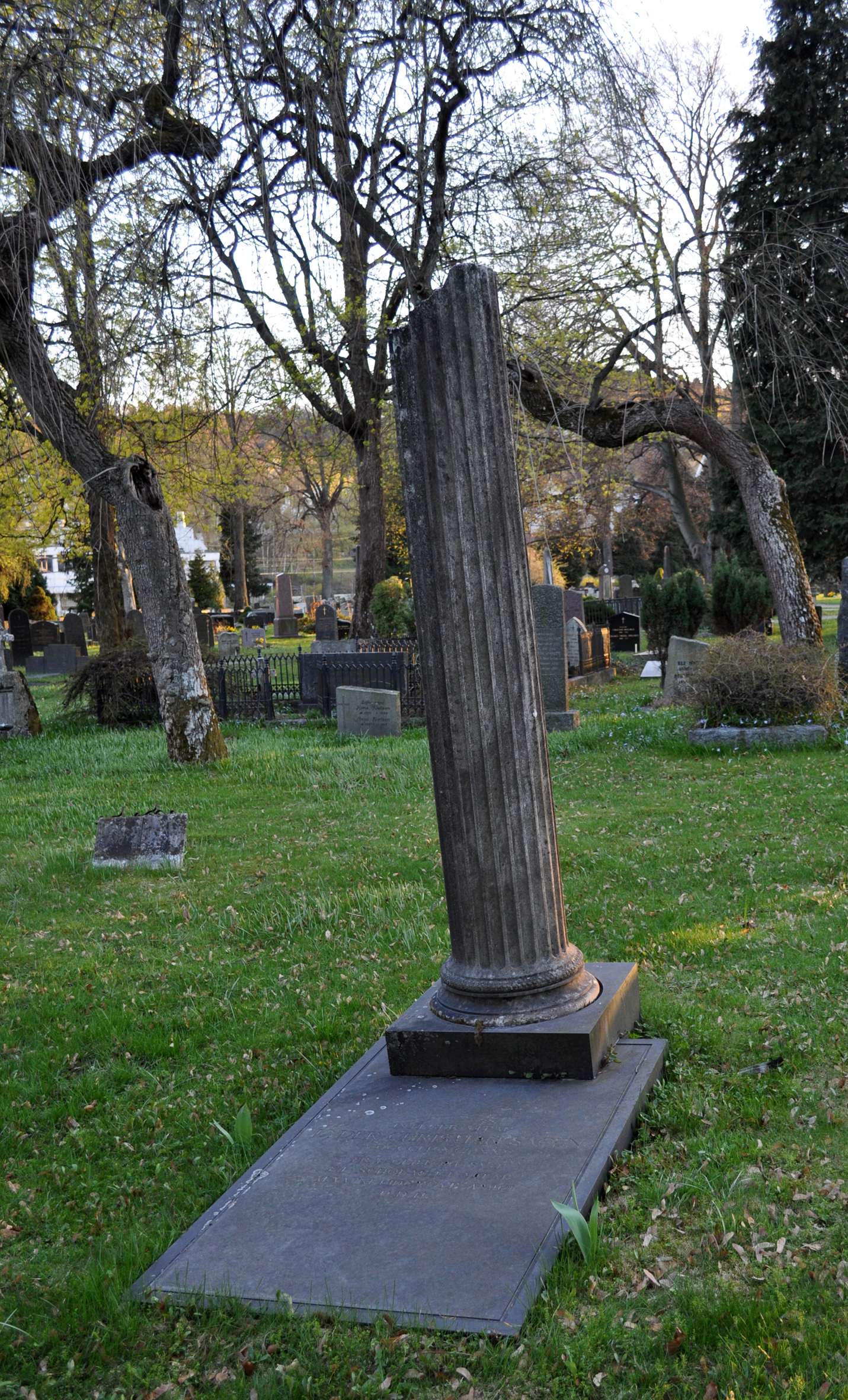 Kristiansand kirkegård